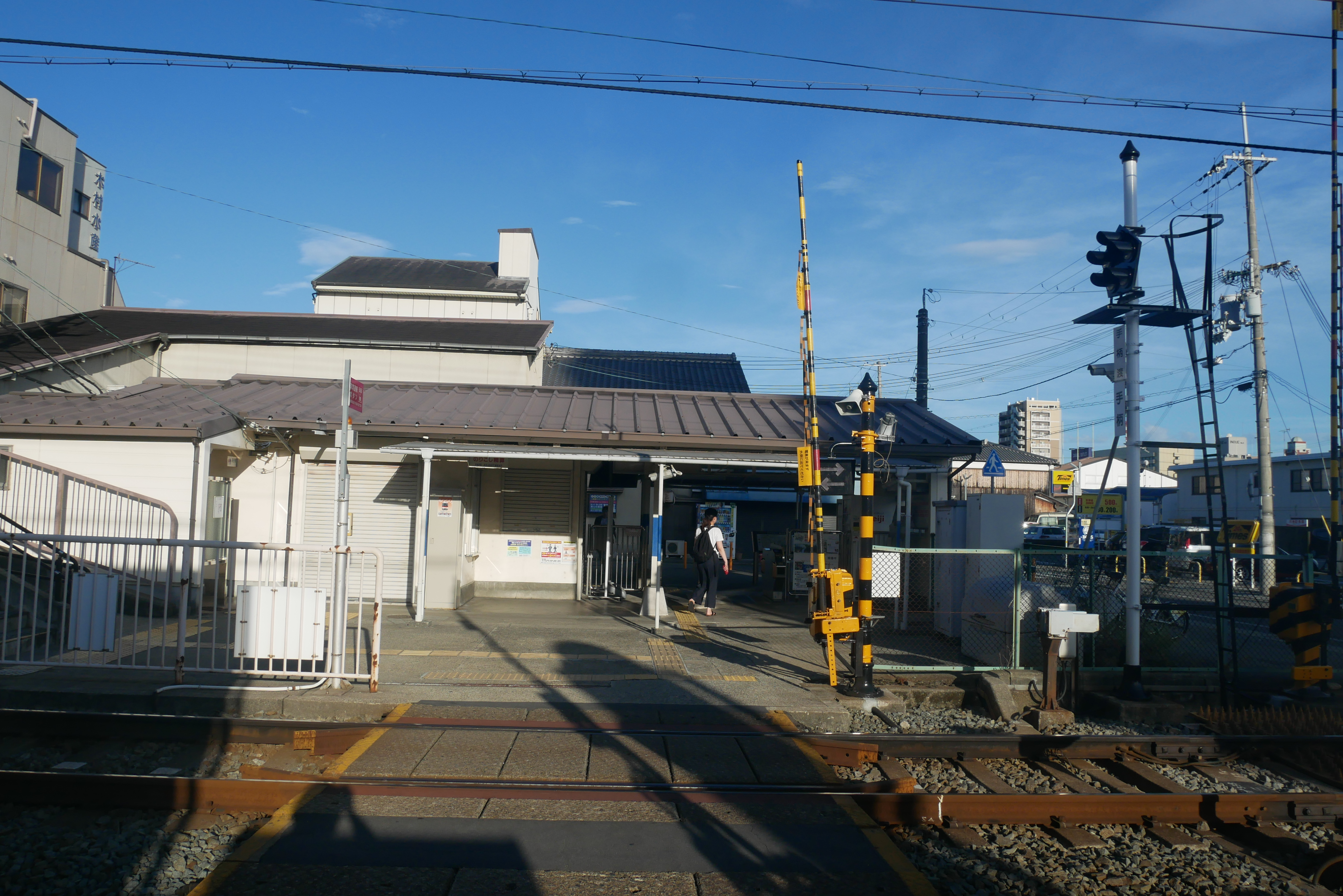 手柄駅 (Tegara Station)